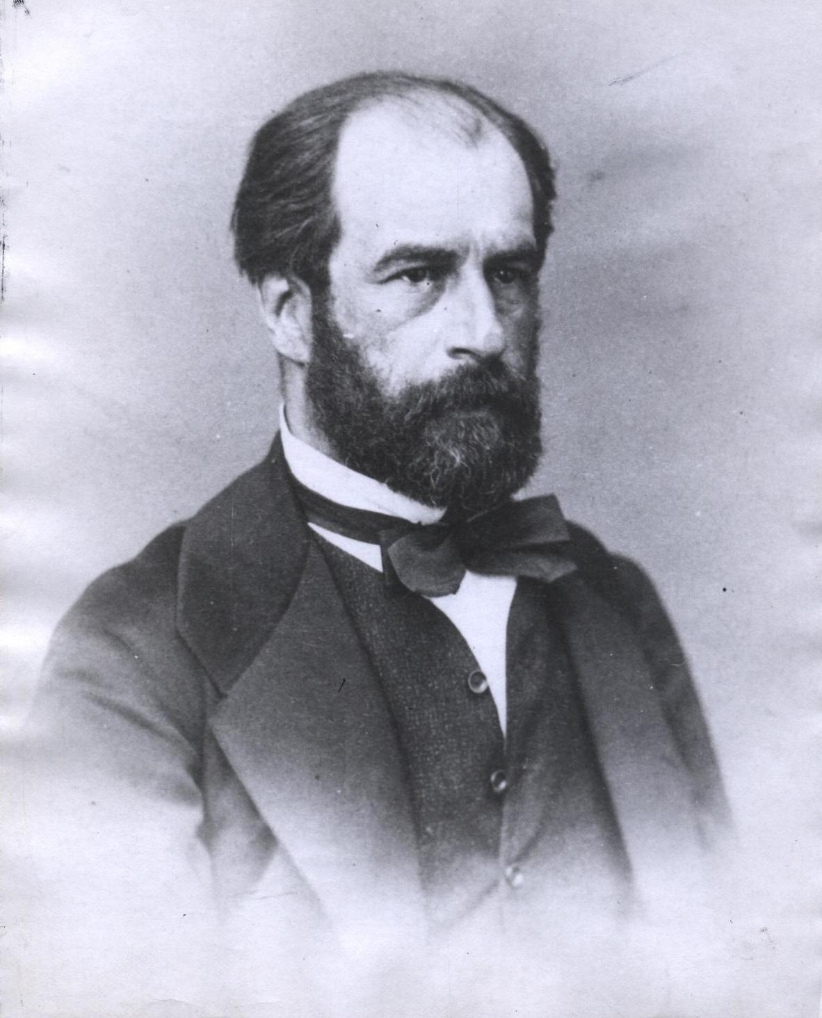 Federico Errázuriz Zañartu (Santiago, 25 de abril de 1825-ibídem, 20 de julio de 1877) fue un abogado y político chileno, presidente de la República entre 1871 y 1876. Fue el primer Presidente nacido posteriormente a la independencia del país.